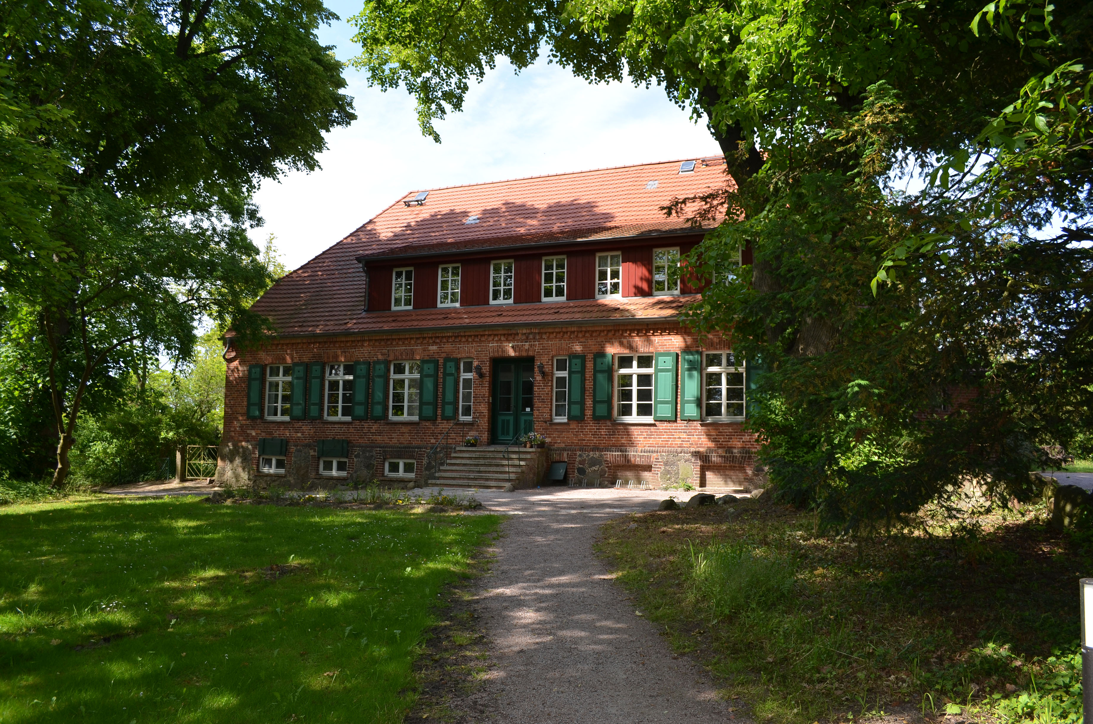 Kühlungsborn, Schlossstraße, ev. Johanniskirche, Pfarrhaus 1